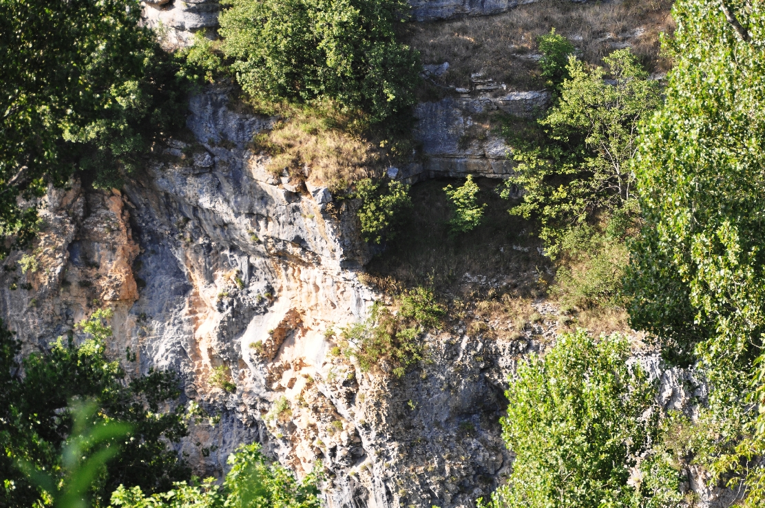 Caramanico Terme 2014